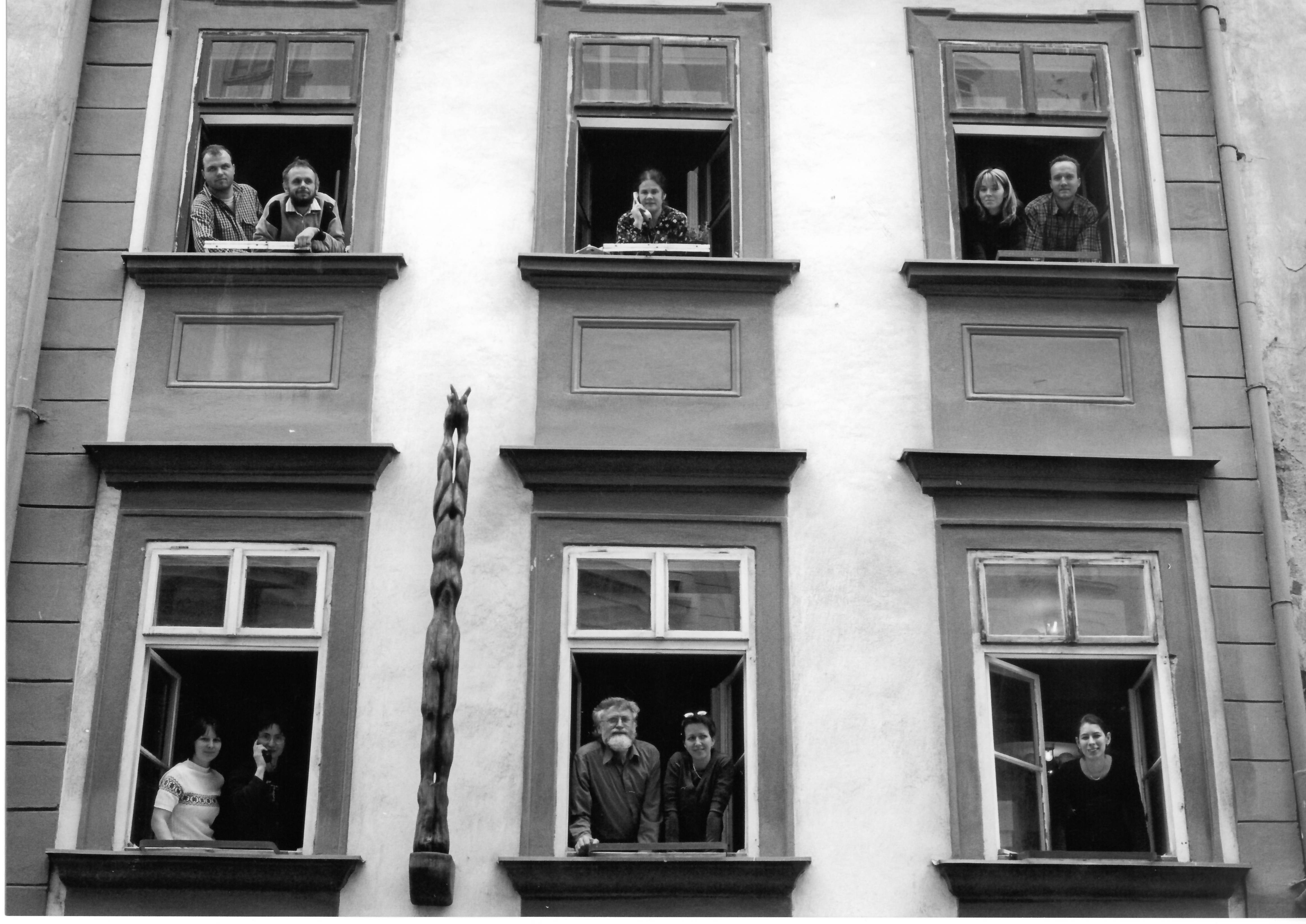 Dům ochránců přírody, Panská 9